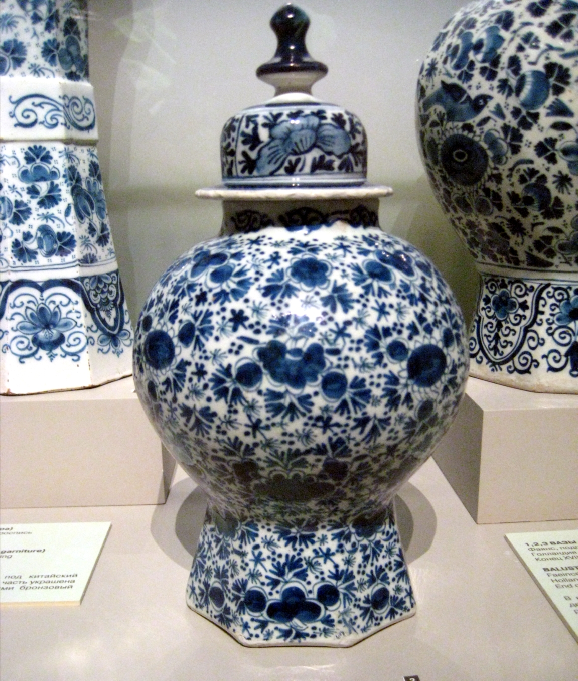 Delftware in Pushkin museum